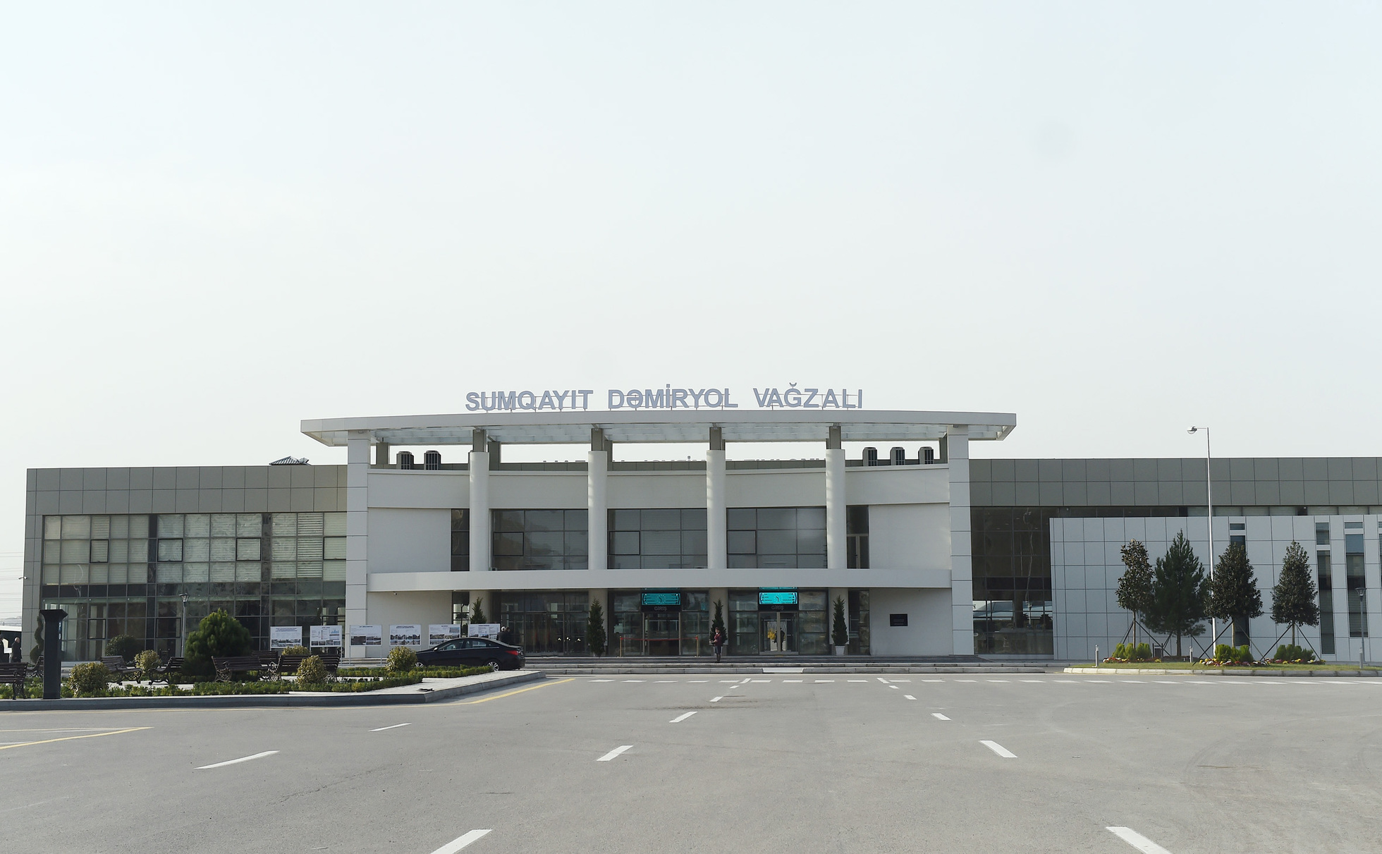 Новый вокзал станции Сумгаит, Азербайджан